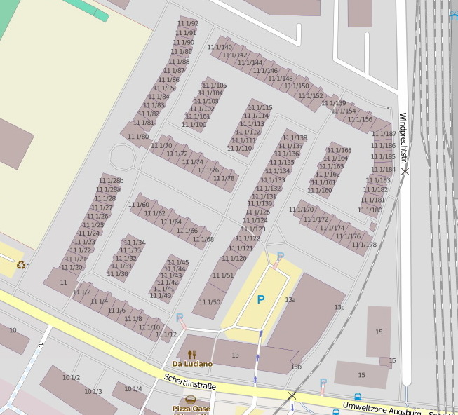 Schertlinstrasse 11 in Augsburg mit Bruchteilhausnummern bis mehr als 180